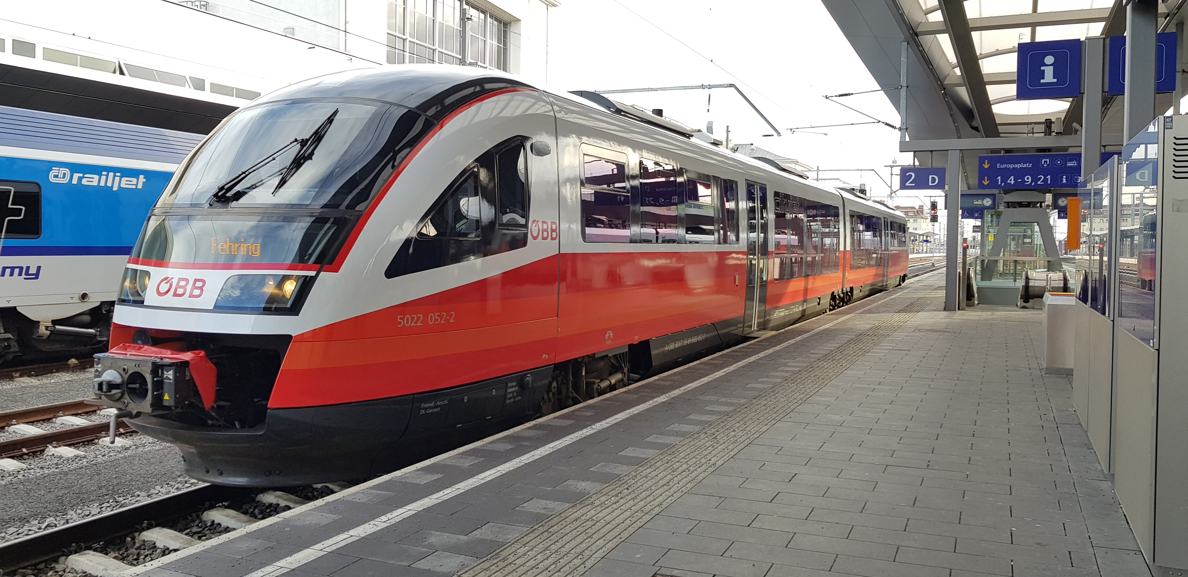 ÖBB 5022 052 in Graz Hauptbahnhof